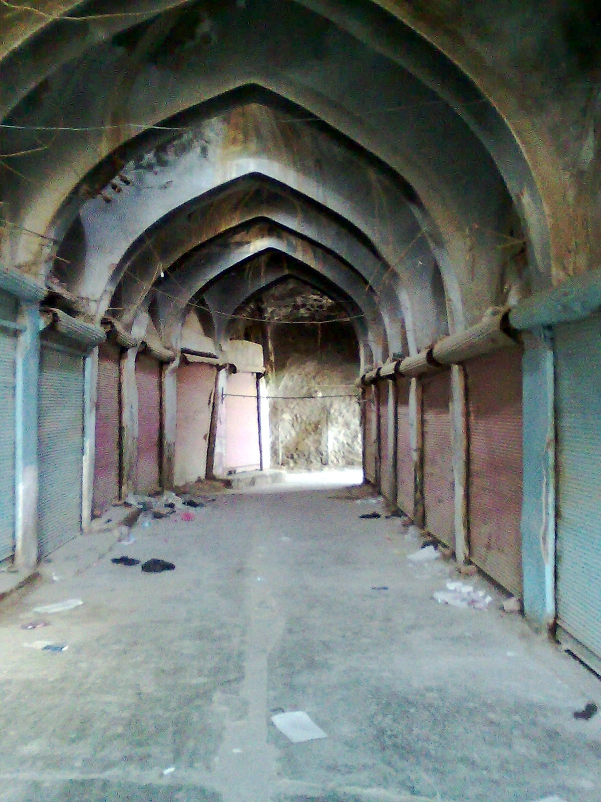 تۆرکجه: کفری شهرین بازاری آذربایجانین شهرلرینه تای طاق گونبزلی بازاری وار دیر.